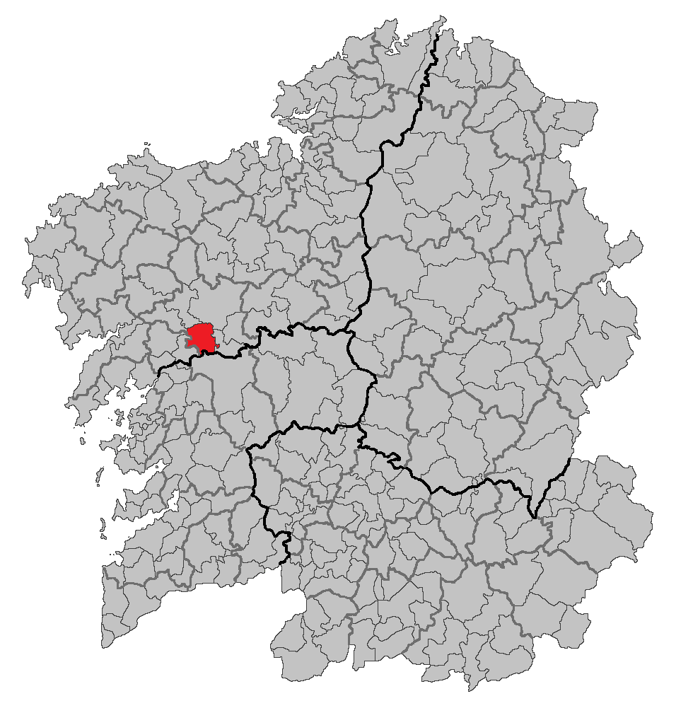 Mapa coa localización do concello de Teo.